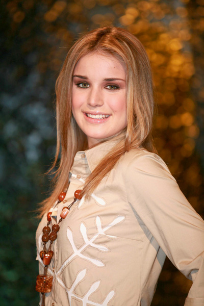 fotografia